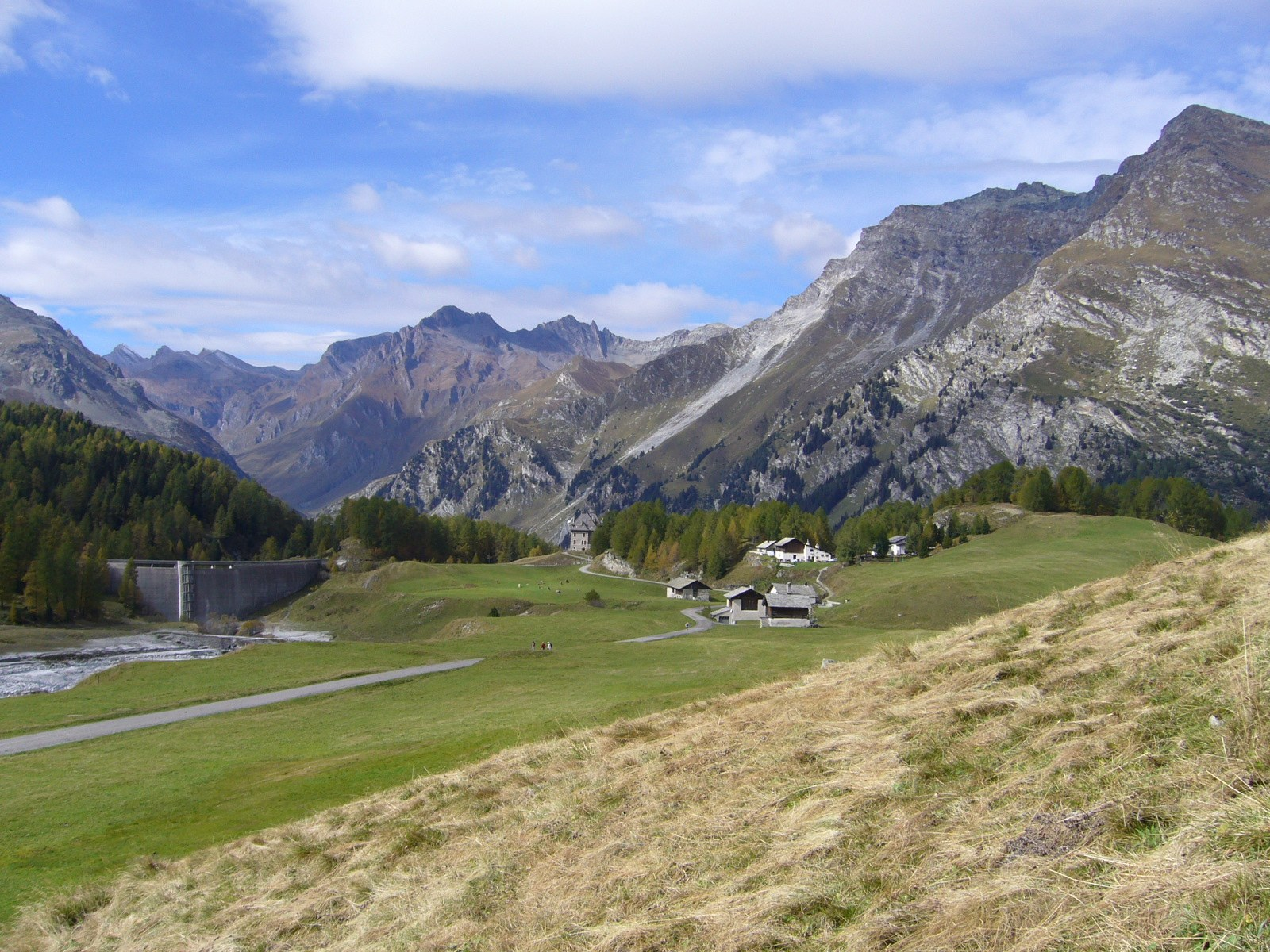 Maloja, Seitental Orden, Blick von oberhalb Salecina nach Westen auf Val-Maroz-Gipfel, rechts im Bild Gipfel des Lunghin